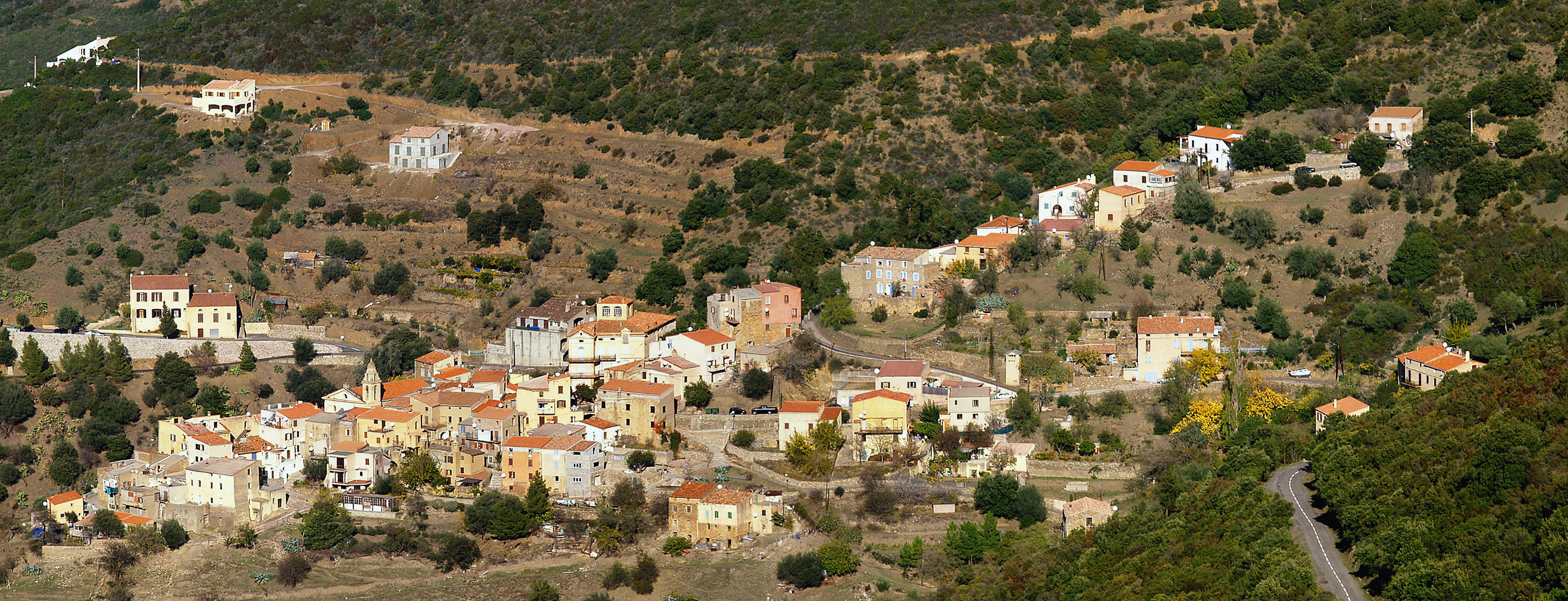 Novella (Corsica) - Panorama